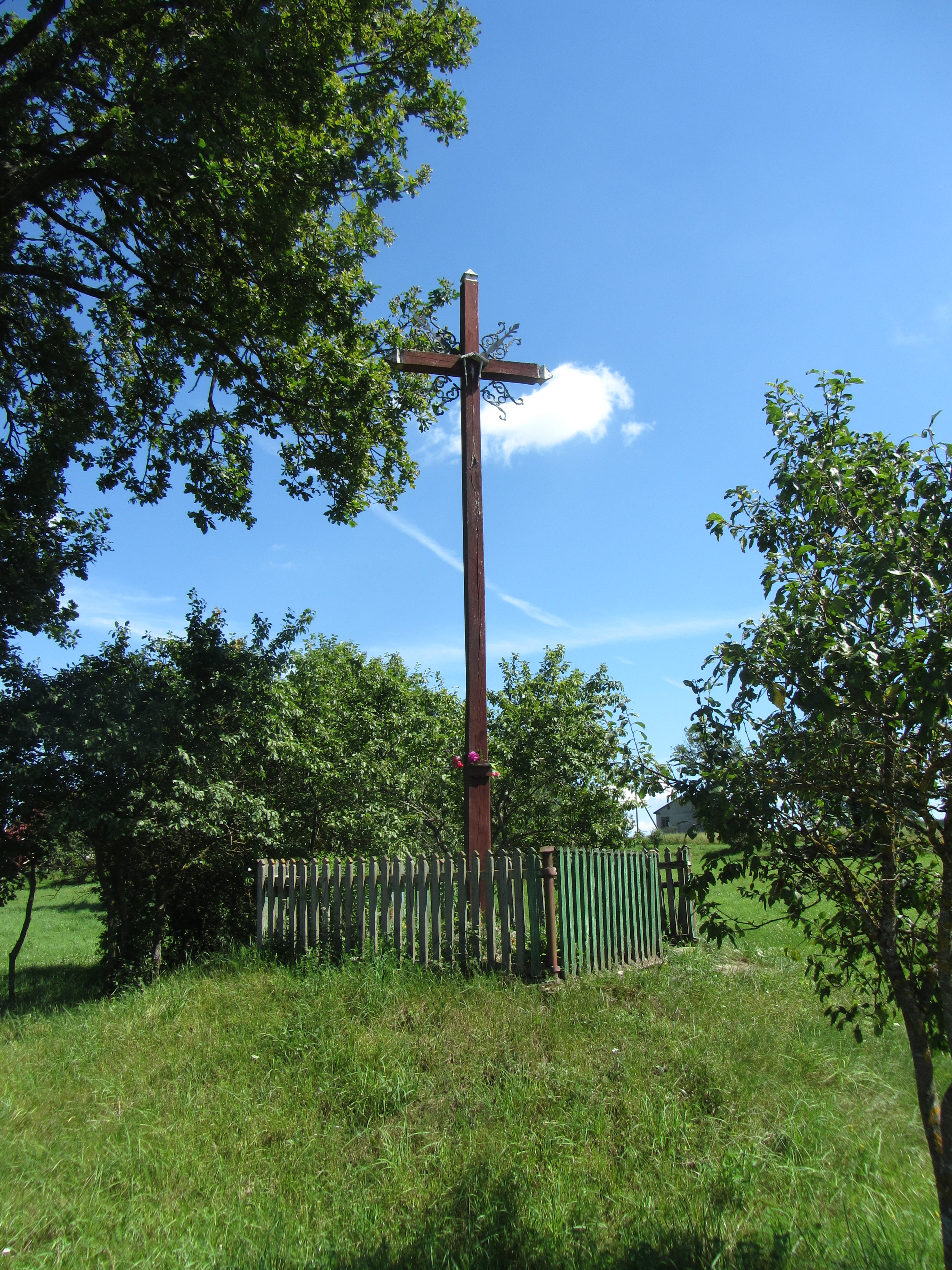 Čebatoriai 65440, Lithuania